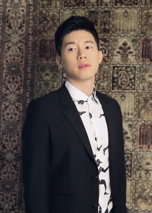 [씬플레이빌] 11월호 김무열 화보촬영